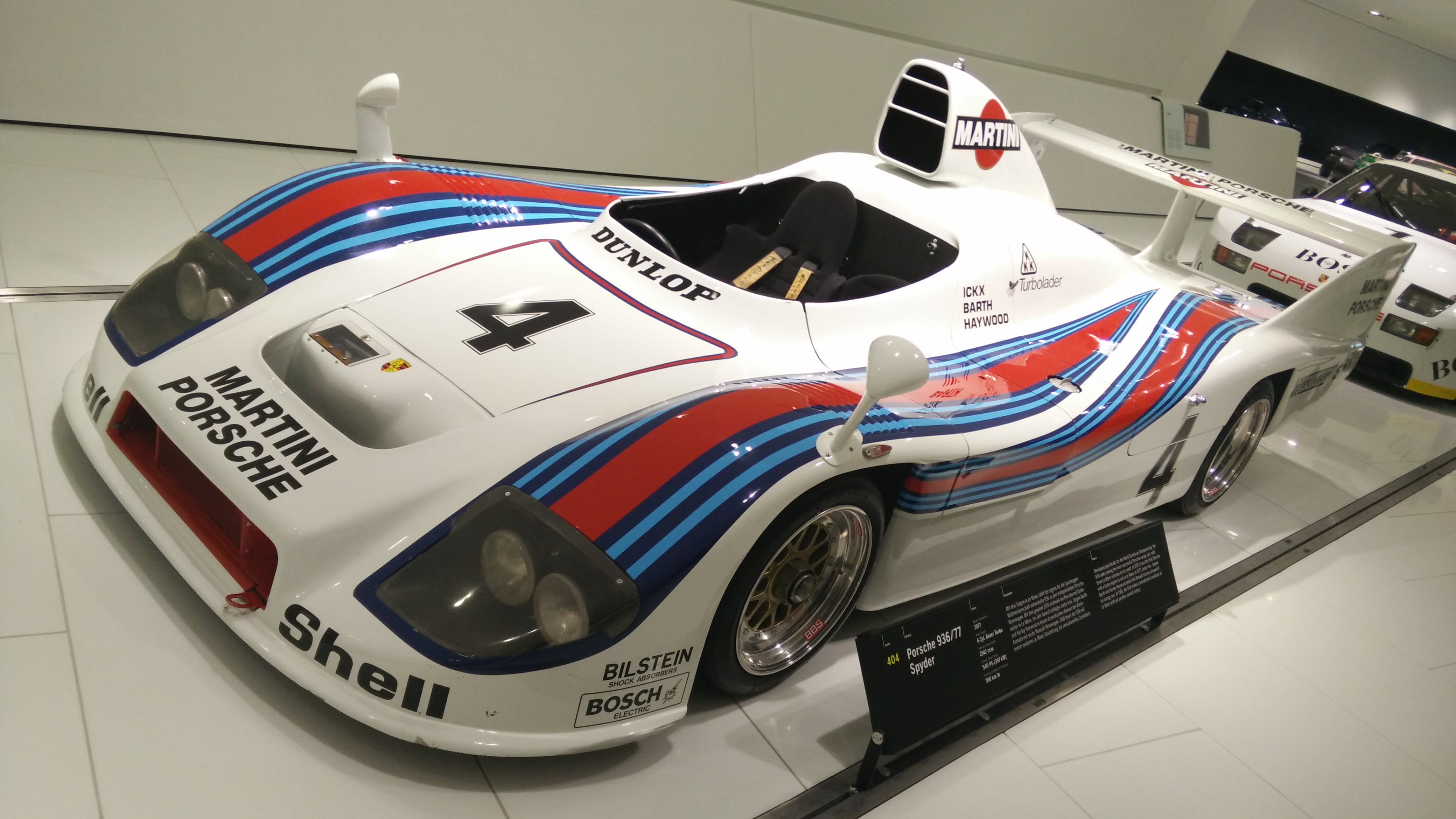 IMG_20141112_122028